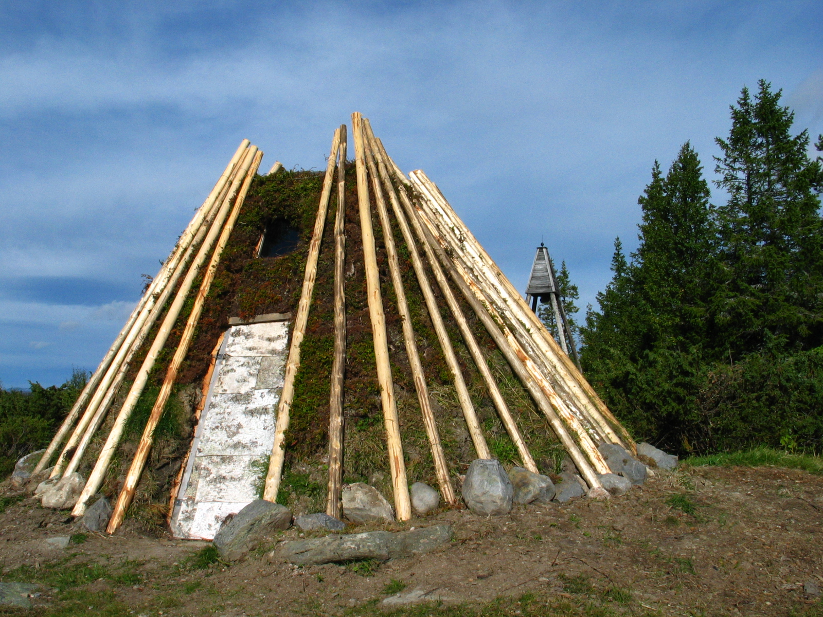 Kåta i Västra Årådalen Foto: Användare:Toggan